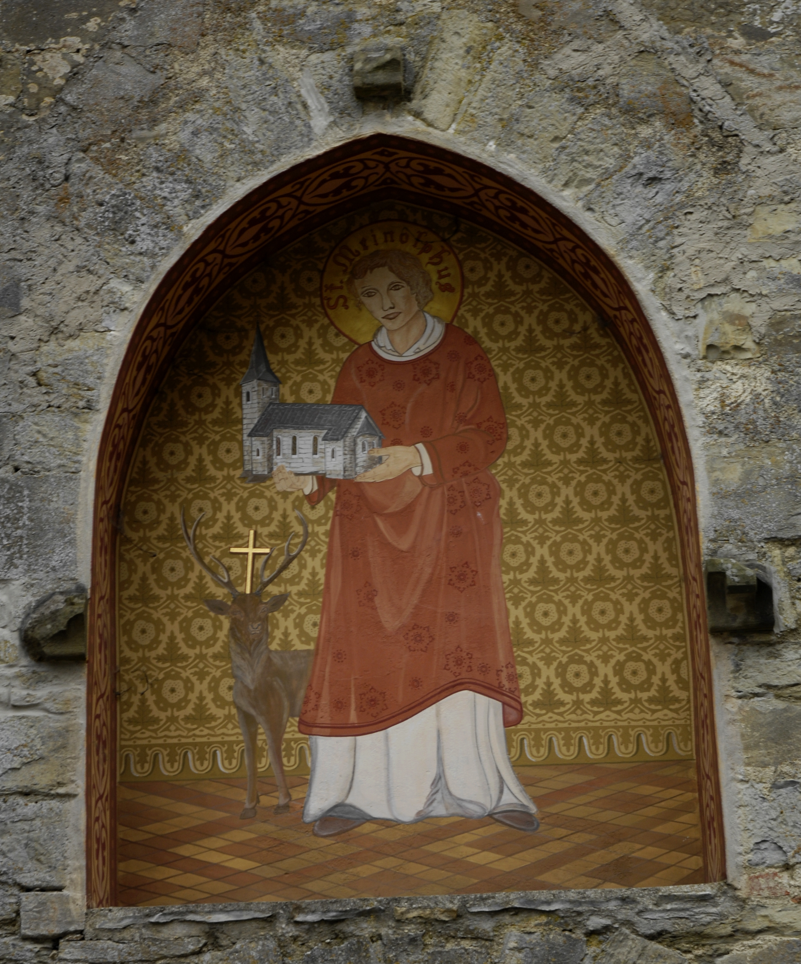 Zweites Heiligenbild (St. Meinolf) am Tor des ehemaligen Klosters Böddeken